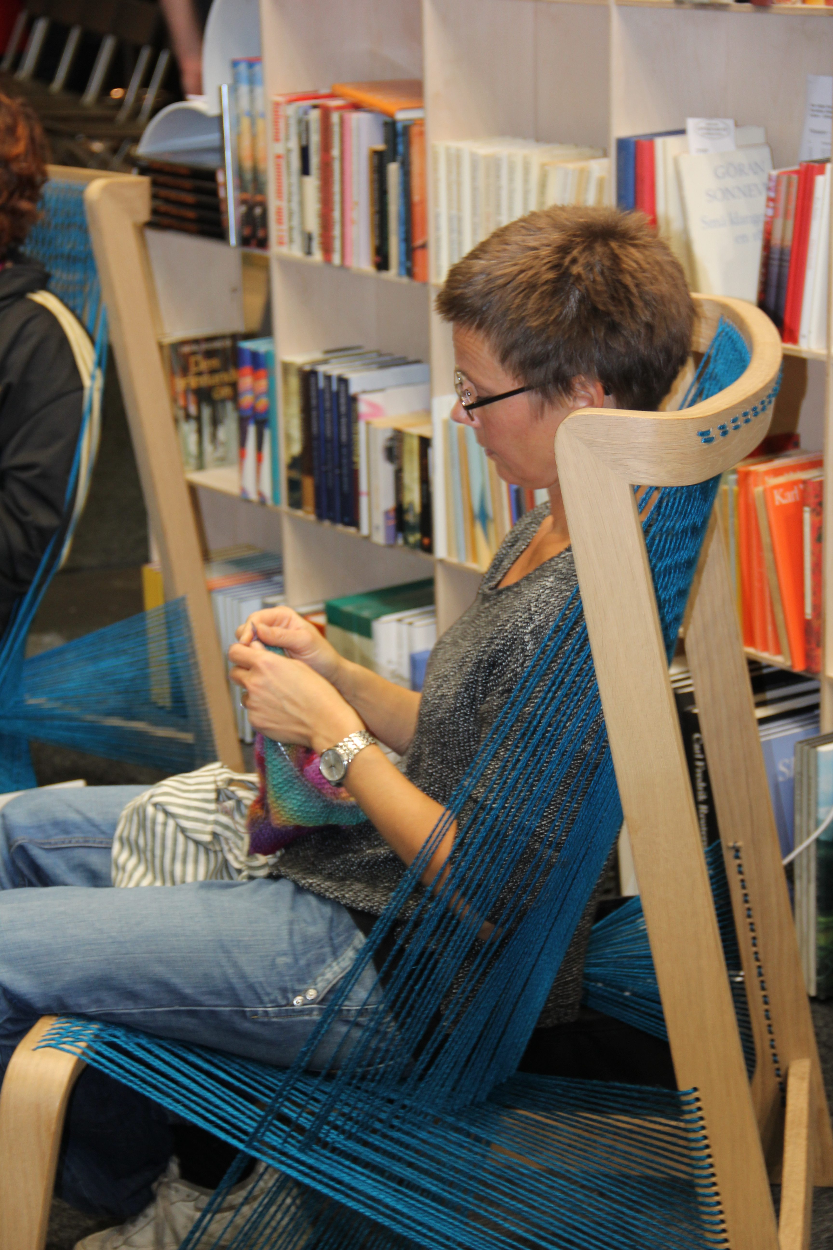 Nordens stand på bogmessen i Göteborg.